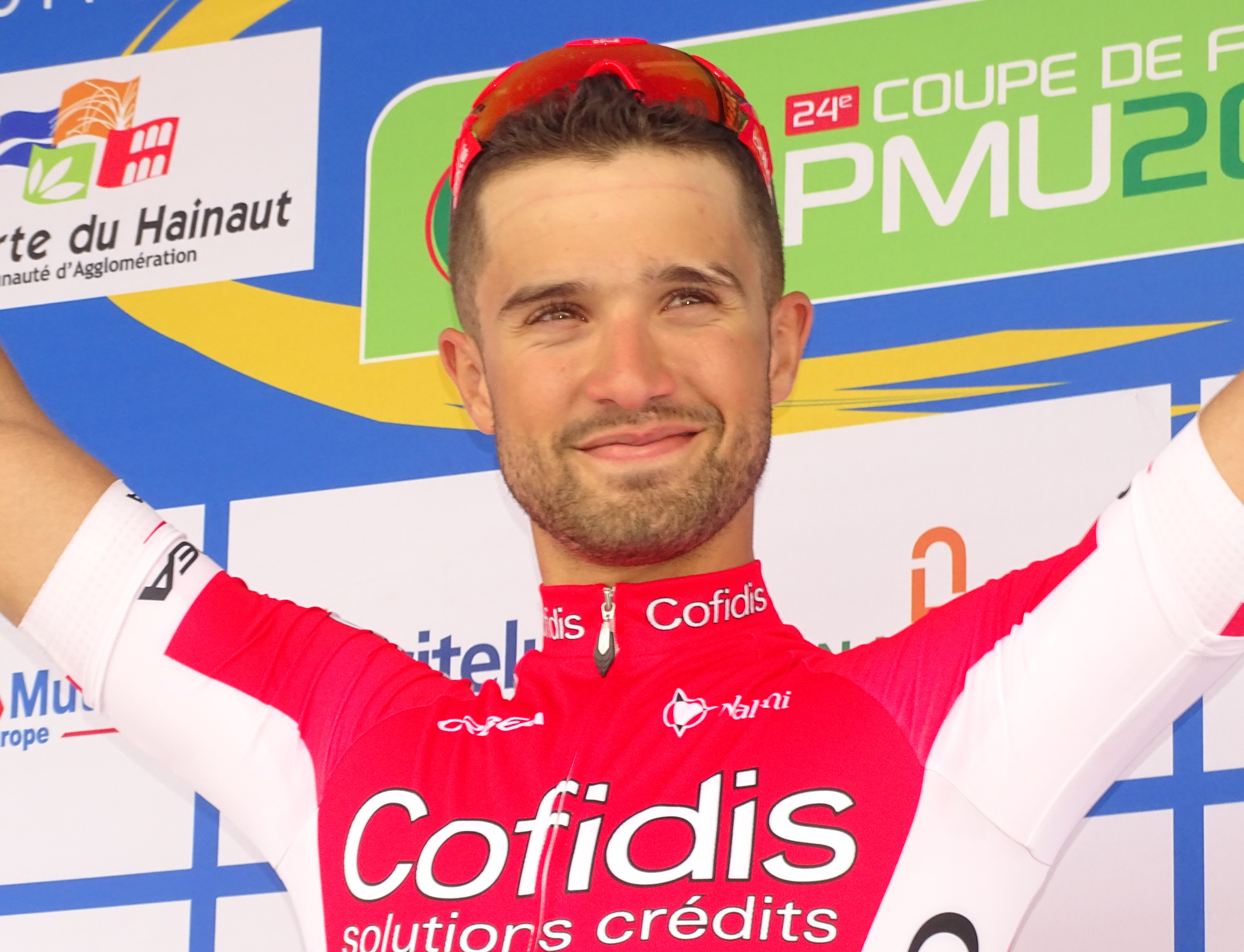 Reportage réalisé le jeudi 16 avril à l'occasion du départ et de l'arrivée du Grand Prix de Denain 2015 à Denain, Nord, Nord-Pas-de-Calais, France.